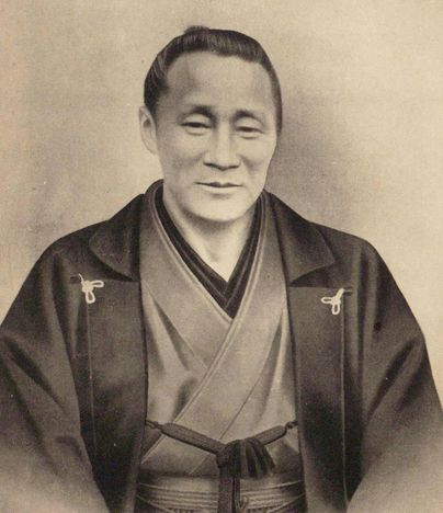 烏丸光徳（1832-1873）